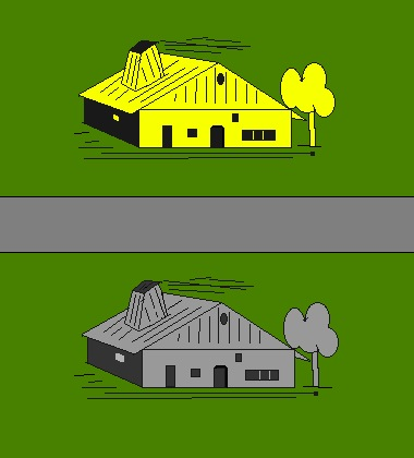 Armoiries de l'ancienne commune des Eplatures canton de Neuchâtel Suisse